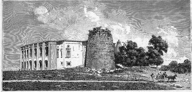 Estampe de Casina Spinelli année 1800 Suessula province de Naples